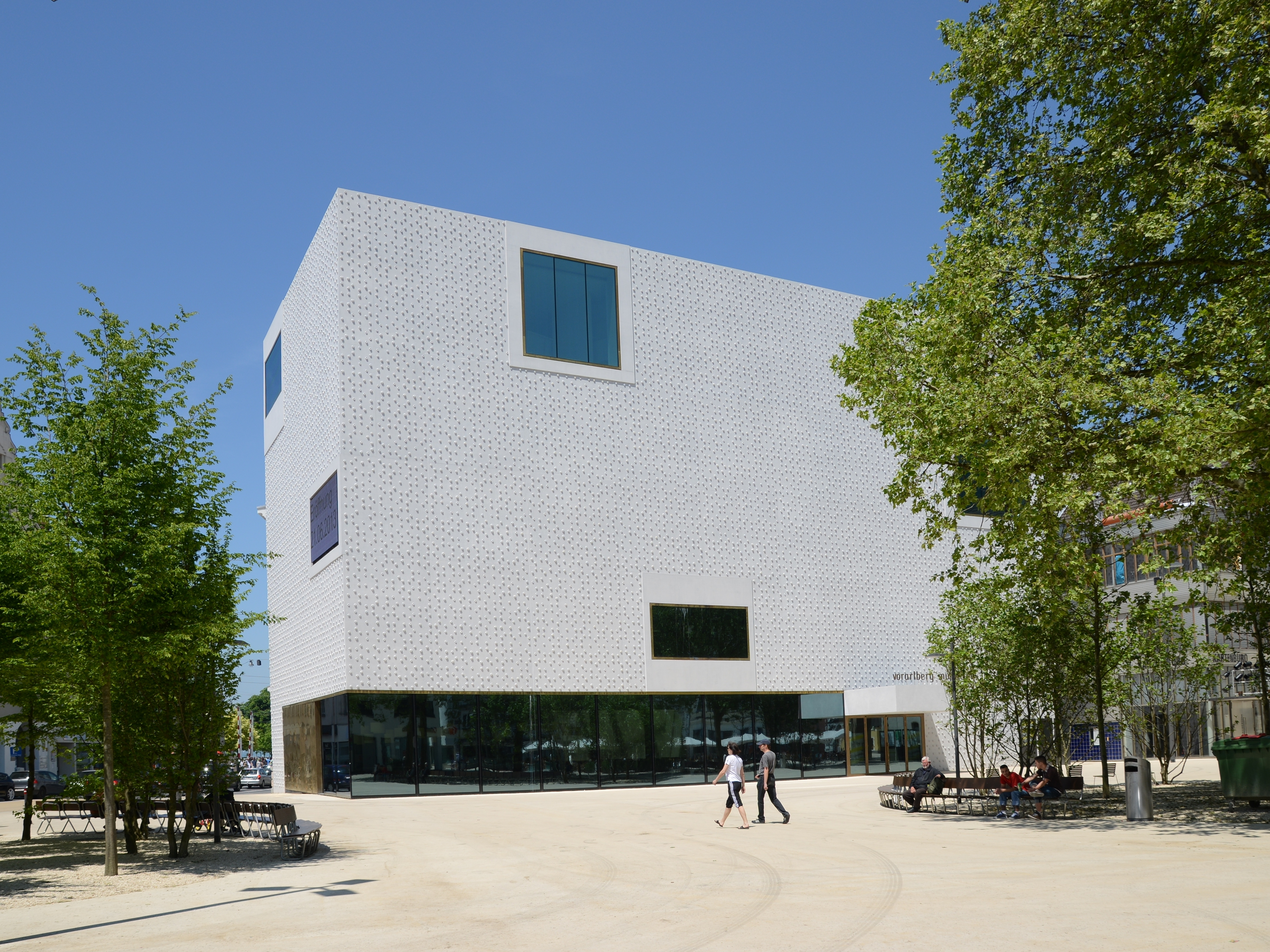 Vorarlberger Landesmuseum, in Bregenz Fassade zur Rathausstraße (links) und zum Kornmarkt.